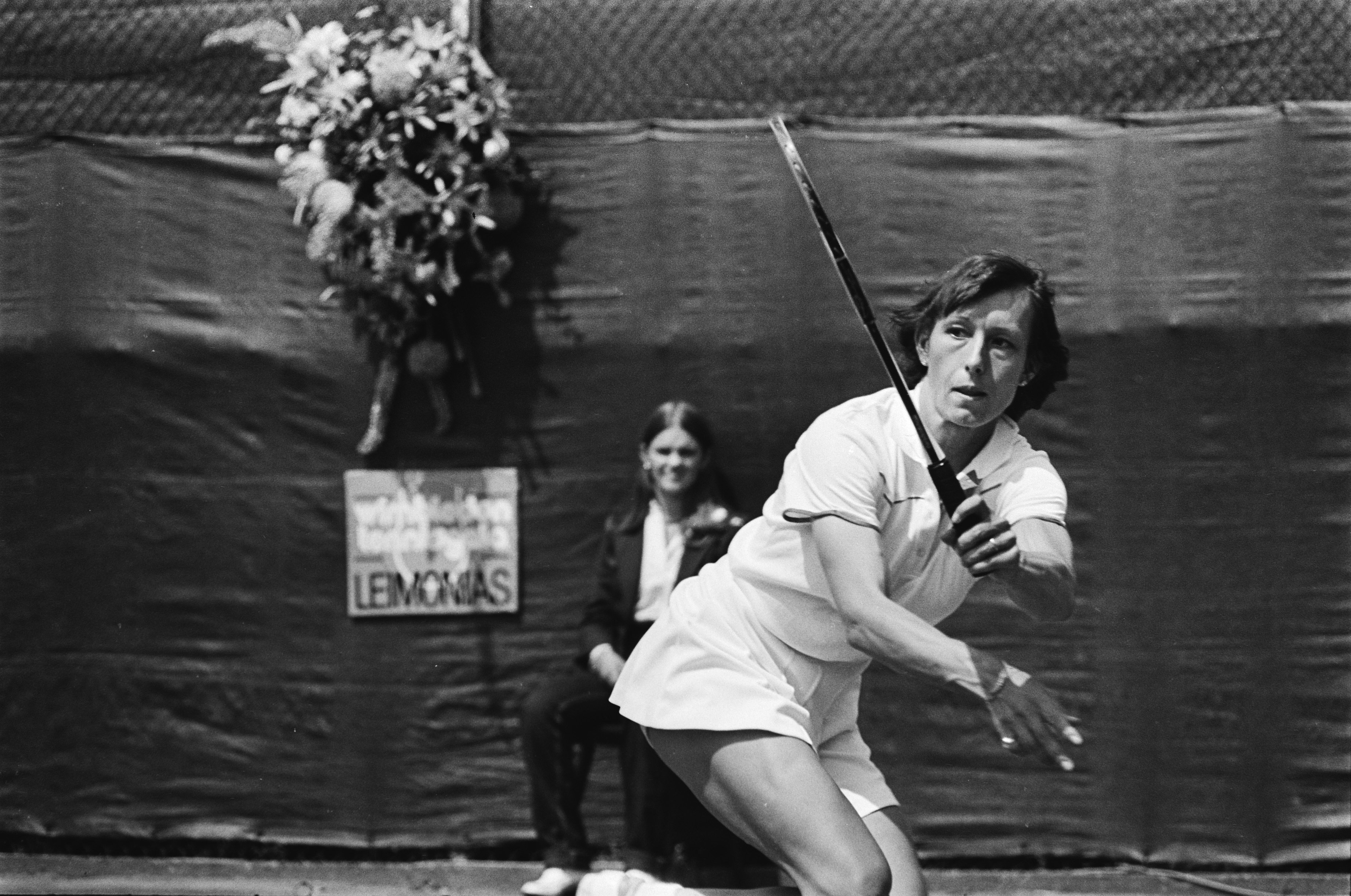 Collectie / Archief : Fotocollectie Anefo Reportage / Serie : [ onbekend ] Beschrijving : Tennis: Nederland tegen Verenigde Staten in Den Haag ; Navratilova in aktie Datum : 6 juli 1980 Locatie : Den Haag, Zuid-Holland Trefwoorden : tennis Fotograaf : Dijk, Hans van / Anefo Auteursrechthebbende : Nationaal Archief Materiaalsoort : Negatief (zwart/wit) Nummer archiefinventaris : bekijk toegang 2.24.01.05 Bestanddeelnummer : 930-9118